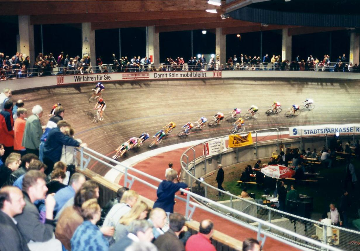 Radsportveranstaltung "Freitag Nacht" 1998